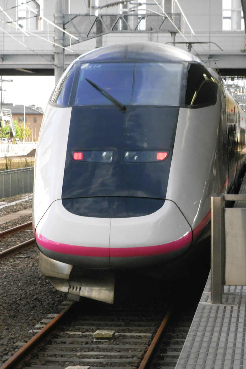 秋田新幹線のホームは青森からの奥羽本線とつながっているのでスムーズに乗り換え可能。